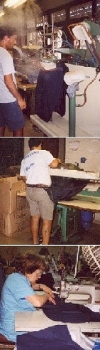 Interior de la fabrica Brukman año 2003